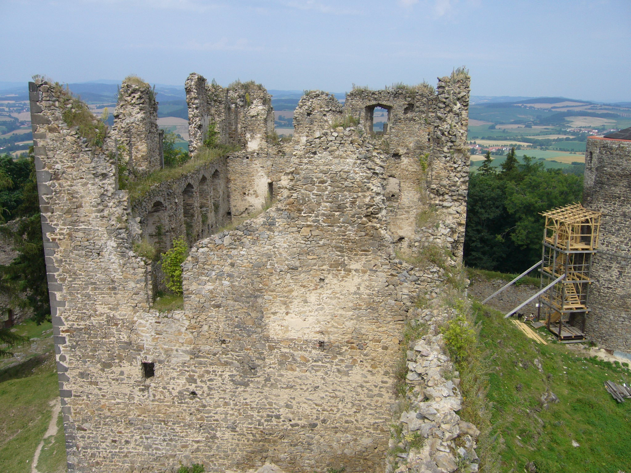 Helfenburk – hradní jádro